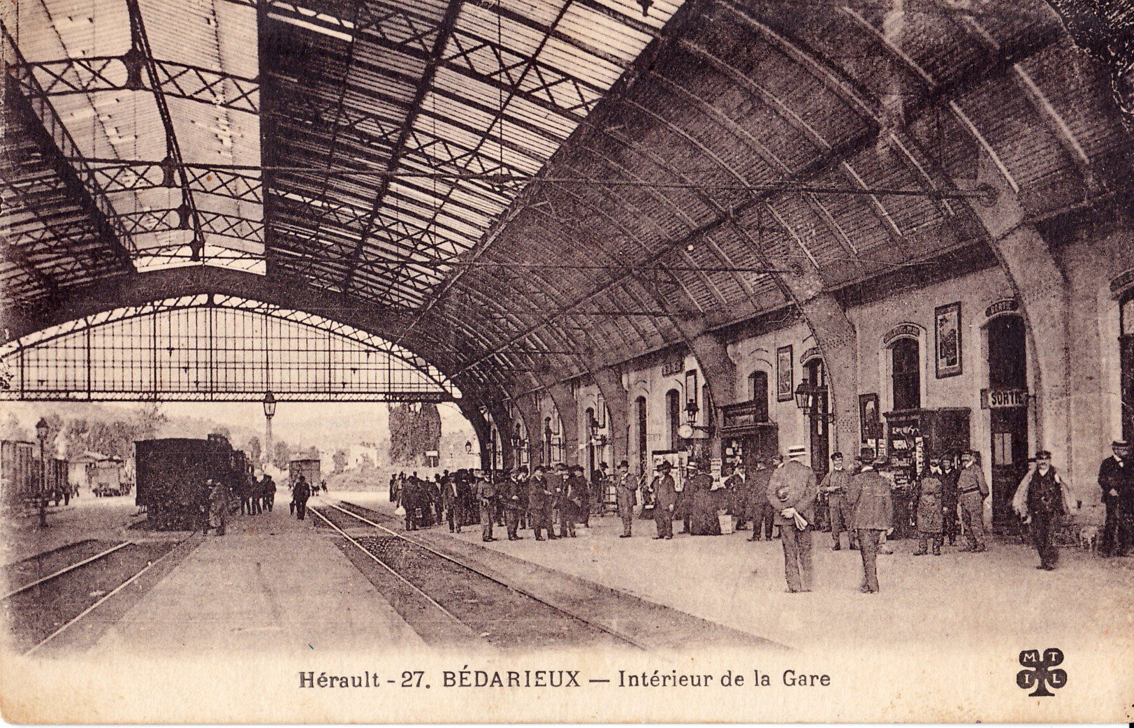 Carte postale ancienne éditée par MTIL, n°27 :BEDARIEUX - Intérieur de la Gare